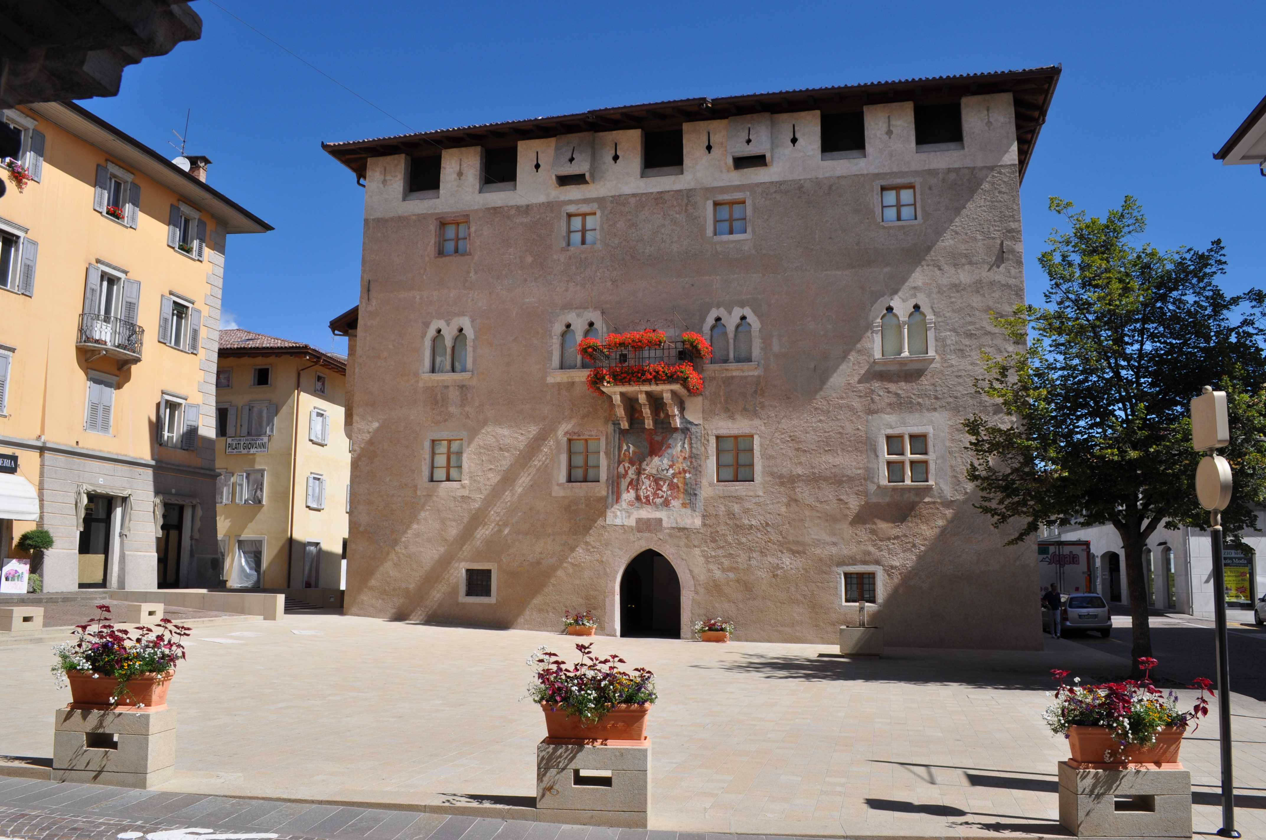 Fotografia dell'esterno del Pazzo Assessorile di Cles. Facciata anteriore